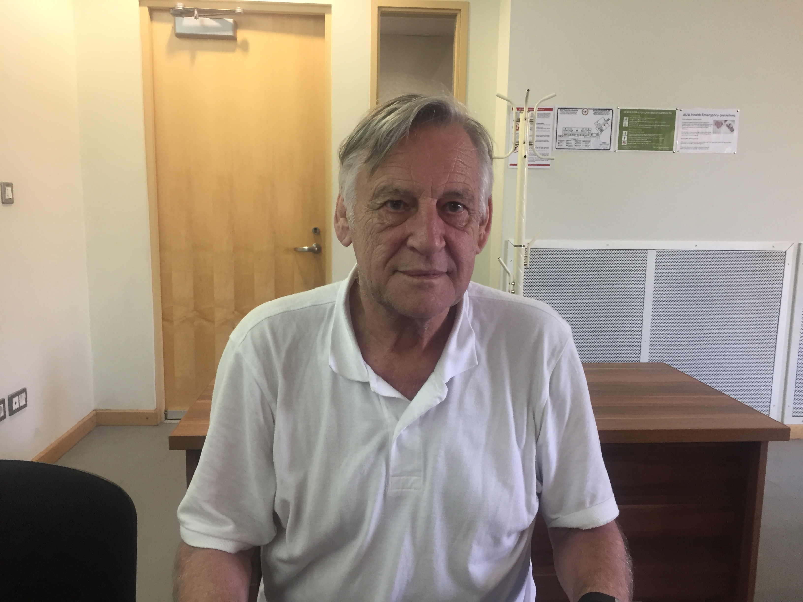 Հանս Կամպ